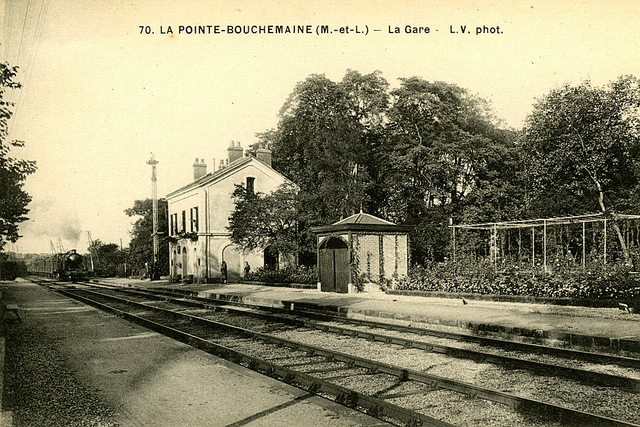 Gare de La Pointe - Bouchemaine. Carte postale ancienne éditée par L. V. phot. au début du XXe siècle.